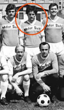 Title: Mannschaftsfoto BSG Motor Suhl Factual corrections and alternative descriptions are encouraged separately from the original description. Additionally errors can be reported at this page to inform the Bundesarchiv. Original historic description: ADN-ZB Schaar 16.6.84 Suhl: Aufsteiger zur Fußball-Oberliga 1984-85: BSG Motor Suhl. Einen Spieltag vor Abschluß der Aufstiegsrunde sicherte sich die BSG Motor Suhl einen der beiden freien Plätze in der Fußball-Oberliga. Die Thüringer spielen damit in der nächsten Serie erstmals in der höchsten DDR-Fußballklasse. Hintere Reihe v.l.n.r.: Trainer Paul Kersten, Wolfgang Reuter, Peter Staps, Hartmut Weiß, Andreas Böhm, Roman Seyfarth, Andreas Schneider, Dieter Kurth, Klaus Schröder, Matthias Brückner, Erhard Mosert, Gerd Schellhase, Mannschaftsleiter Frank Hoffmann und Trainer Ernst Kurth. Vordere Reihe v.l.n.r.: Masseur Peter Eichelbrenner, Klaus Semineth, Dieter Erhardt, Jürgen Schneider, Torhüter Walter Jänicke, Torhüter Klaus Müller, Ralf Eismann, Uwe Jertschewski, Uwe Trömel und Trainer Burkhardt Winkler.